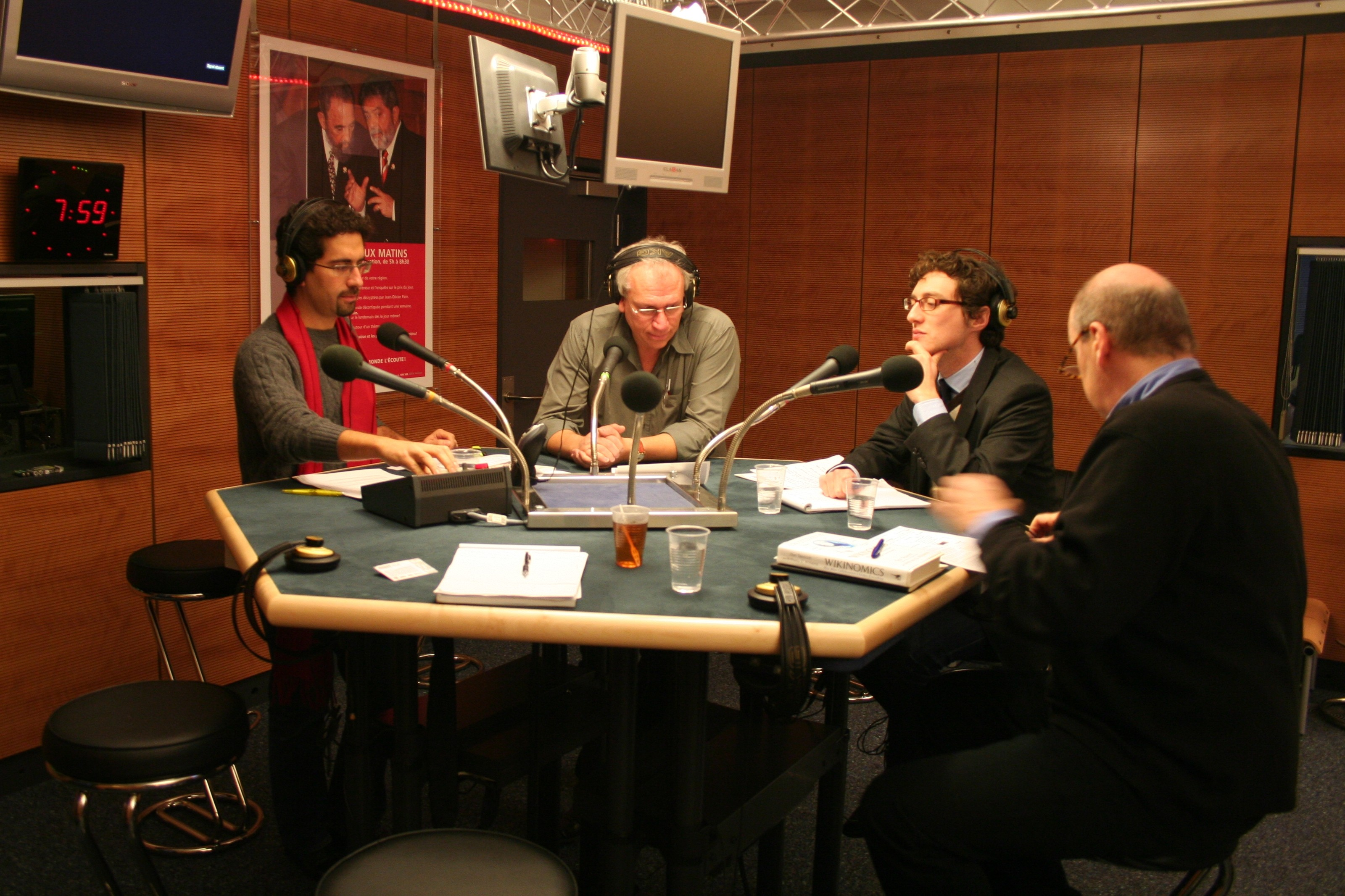 Le plateau de l'émission d'information Le Grand 8 de la Radio suisse romande, le 27 décembre 2007. De gauche à droite, les journalistes Fathi Derder et Didier Duployer, et les invités de l'émission.